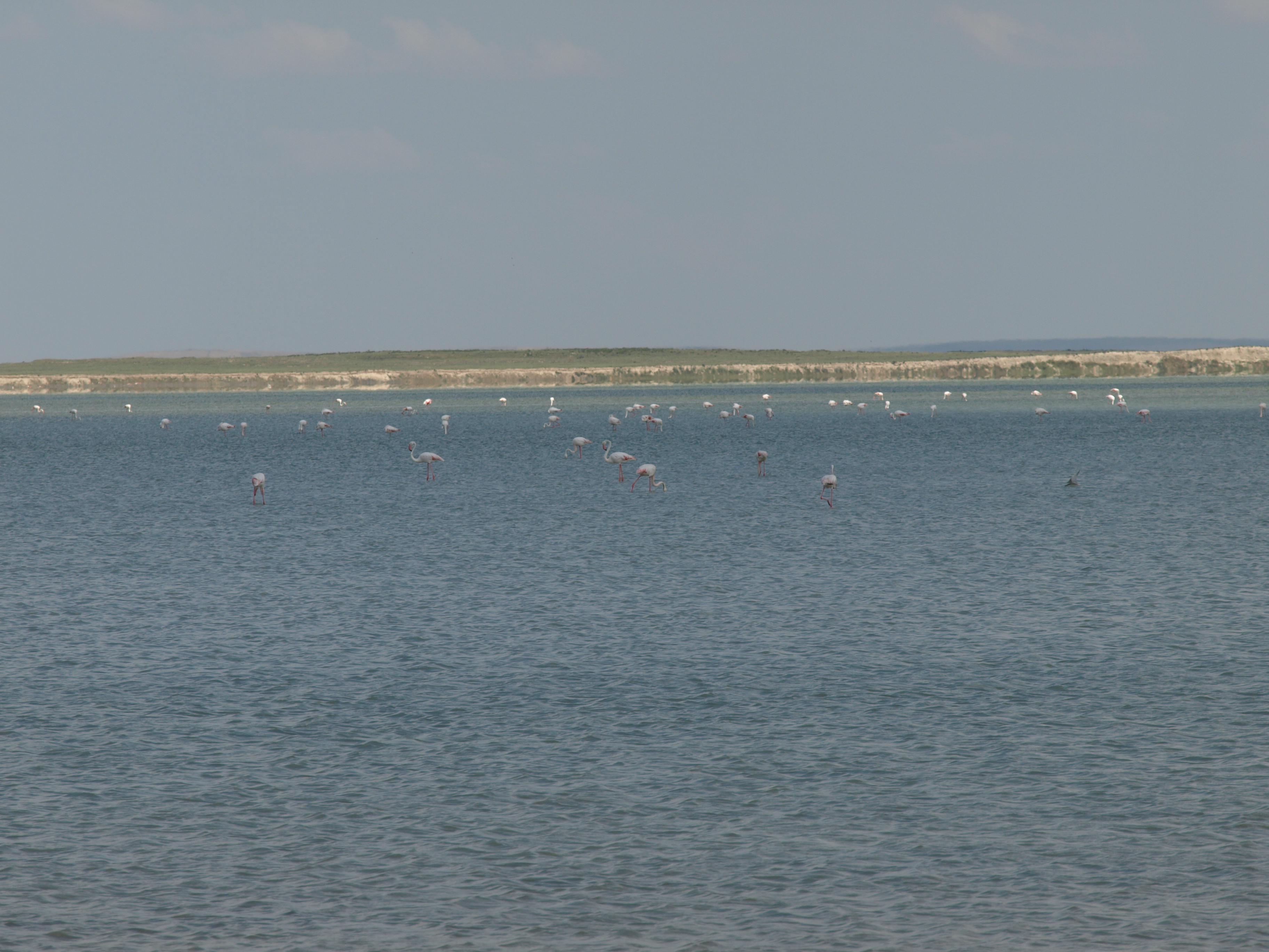 Panorama des Seyfe Gölü mit Flamingos